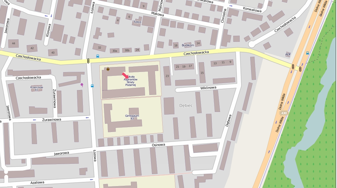 Szkoła Aspirantów Państwowej Straży Pożarnej ul. Czechosłowacka 27, 61-459 Poznań